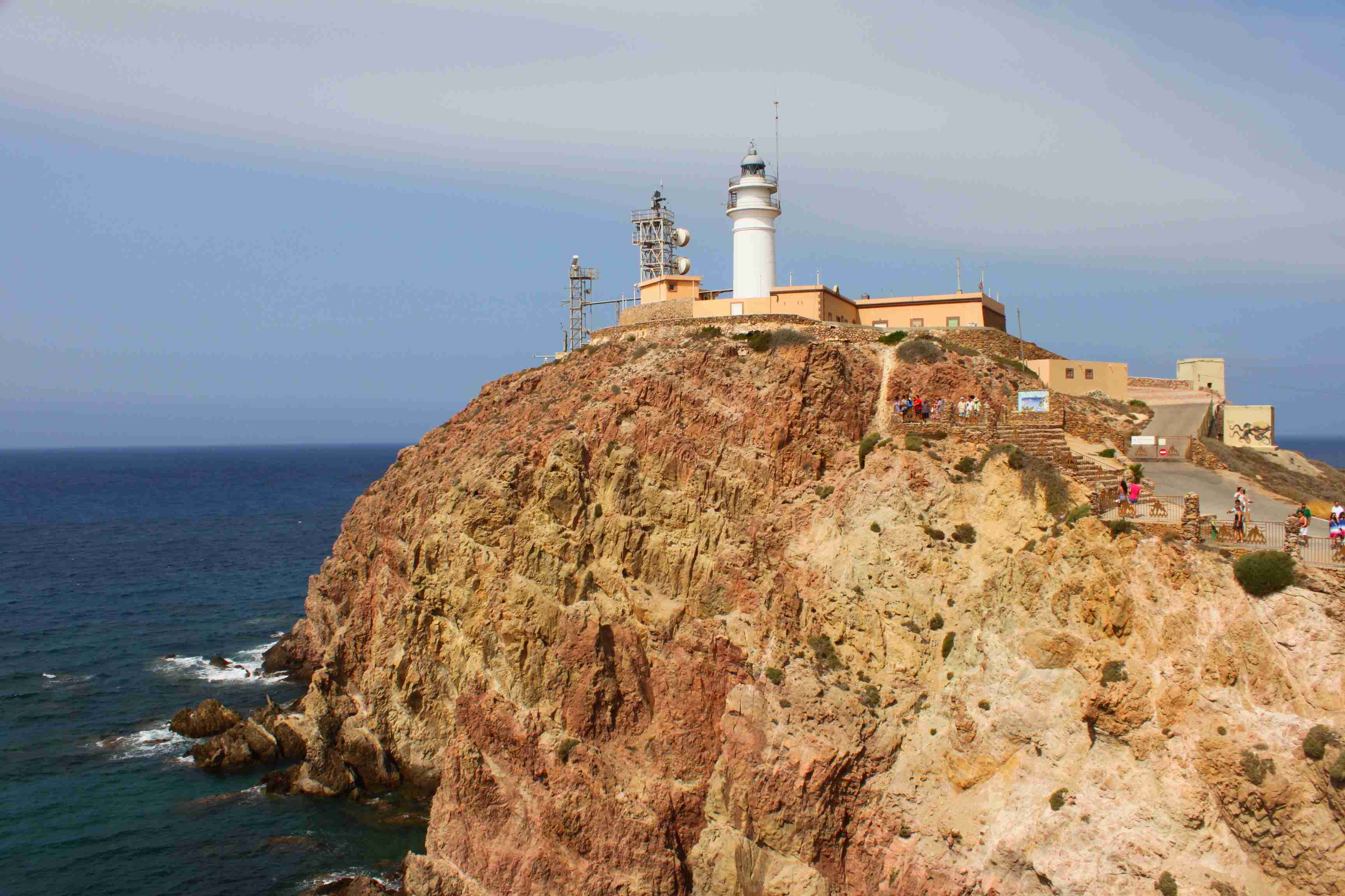 Der Leuchtturm und Aussichtspunkt Faro del Cabo de Gata am Ende der Straße